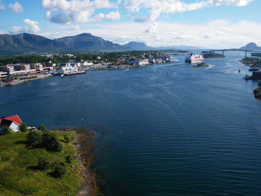 Brønnøysund